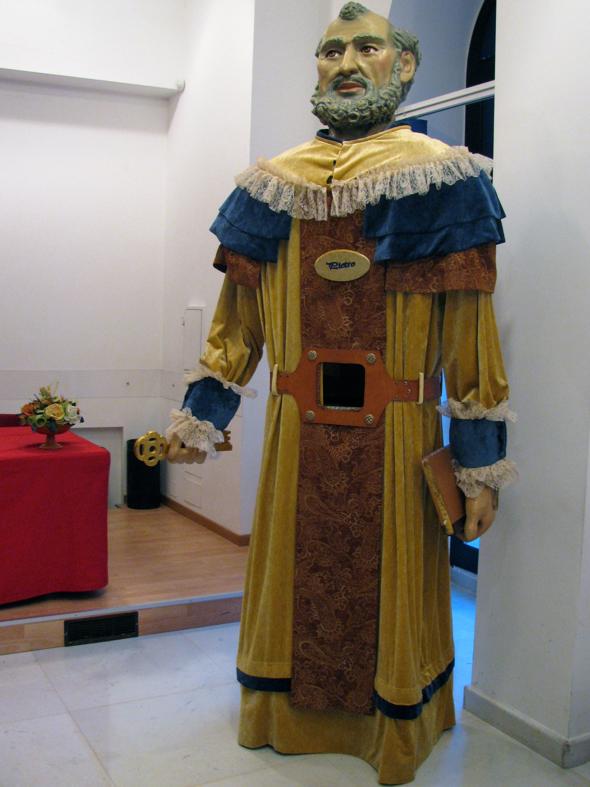 Statua dell'apostolo Pietro che reca nella mano destra la chiave del Regno dei Cieli e nella mano sinistra le Lettere di Pietro.